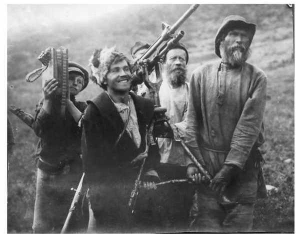 Кадр из кинофильма "Красный газ" 1924 года.